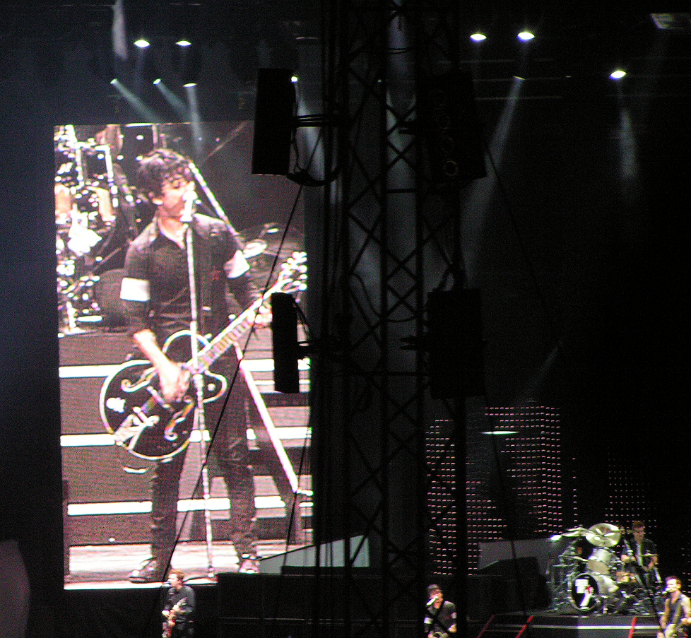 Billie Joe Armstrong of Green Day